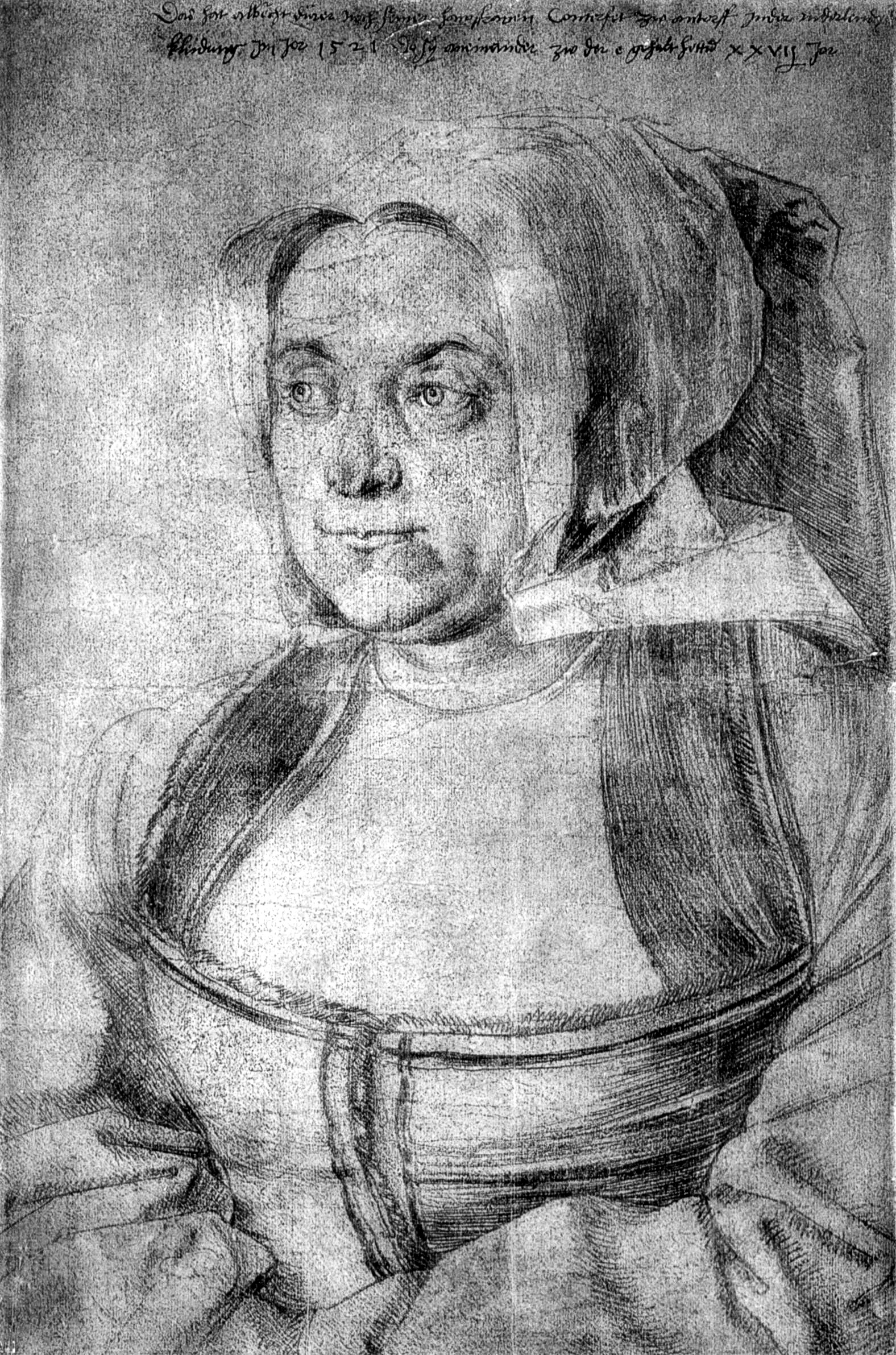 "Agnes Dürerin in niederländischer Tracht", Metallstiftzeichnung von Albrecht Dürer.